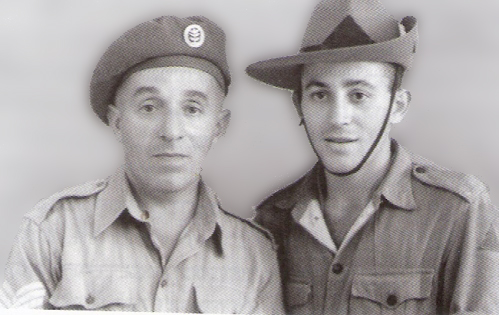 יעקב ומרדכי חירותי